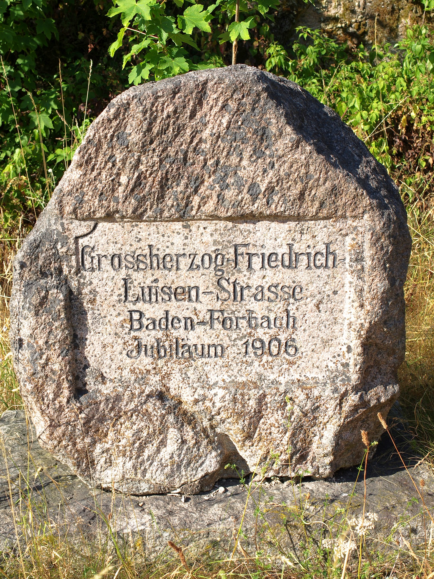 Gedenkstein Grossherzog-Friedrich-Luisen-Strasse Baden-Forbach, Jubiliäum 1906 in Oberbeuern an der Einmündung der L 79 in die L 78.